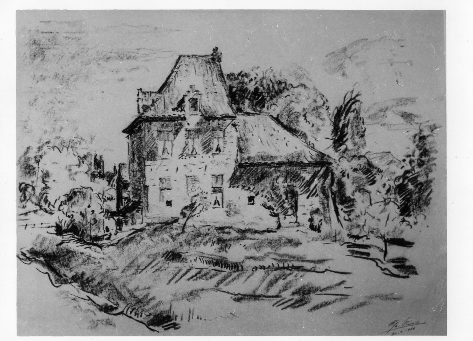 le Slot à Woluwe fusain par Léon van Dievoet 30 mai 1966